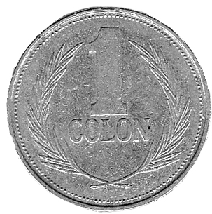 un colon